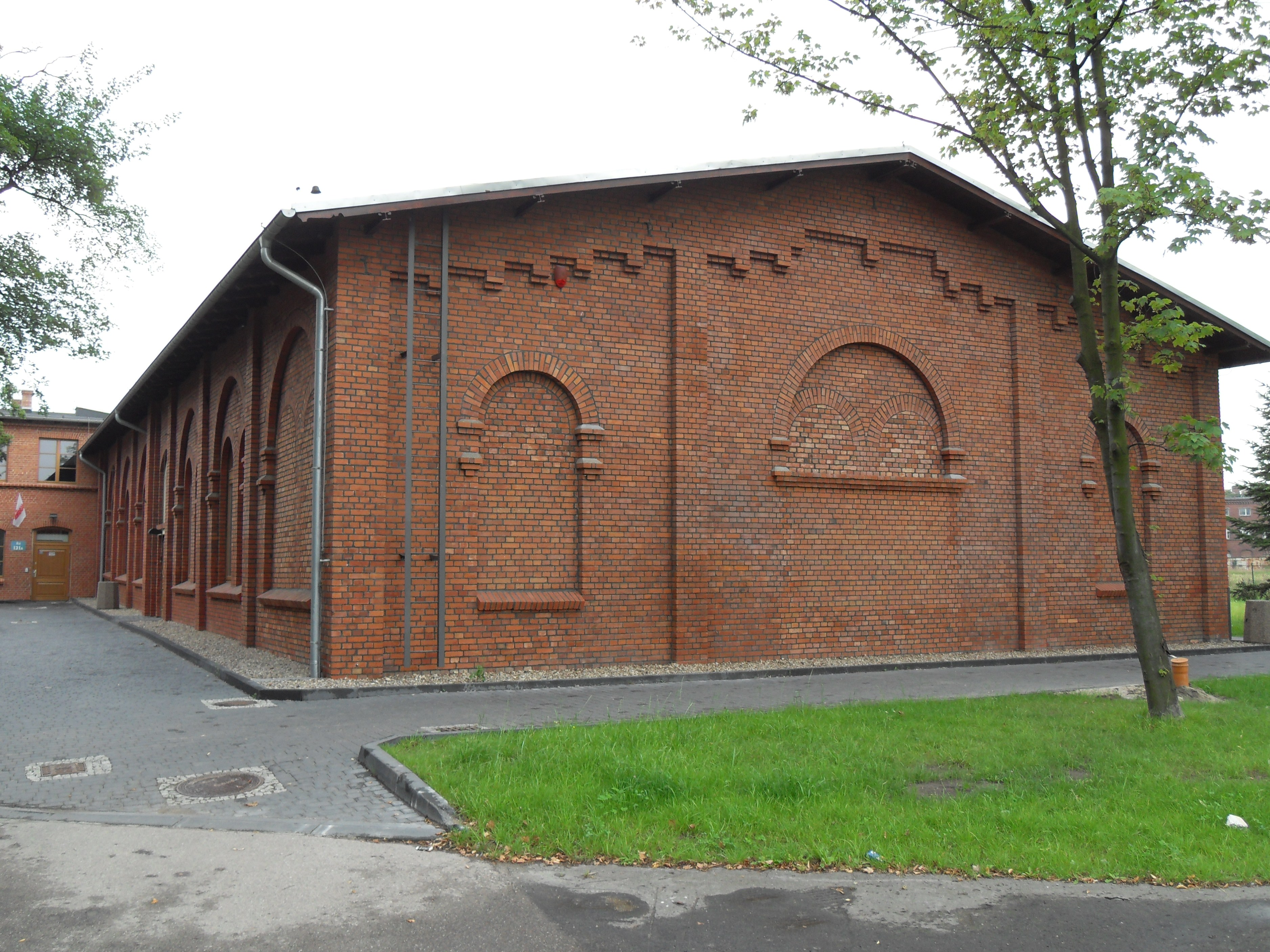 Stocznia Gdańska, sala BHP.